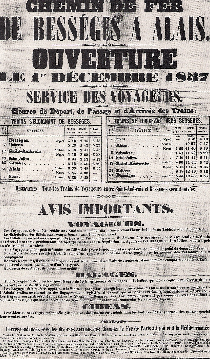 Affiche des horaires de train lors de l'inauguration de la ligne Alès-Bessèges (Gard) en 1857